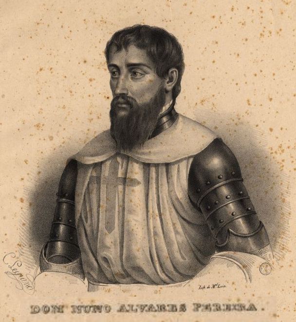 Dom Nuno Alvares Pereira [S.l. : s.n., 1841] ([Lisboa] : Lith. de M e l Luiz. - 1 gravura : litografia, p&b . - Dim. comp. sup.: 19x19,5 cm; dim. comp. inf.: 16x8 cm. - Soares, E. - Dic. icon., nº 124 L) CDU 946.9"1385"(084.1) 929.7Pereira, Nuno Álvares(084.1) 763(=1:469)"18"(084.1)